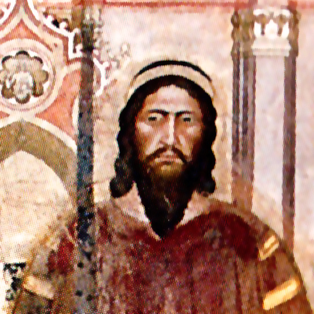 Amédée VI de Savoie, le Comte Vert, représenté dans une fresque à la chapelle des Espagnols de Florence